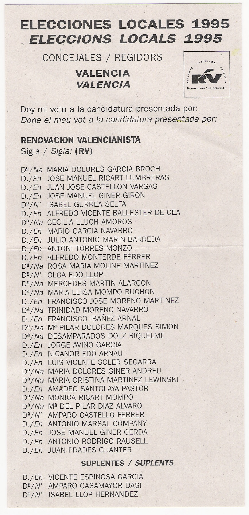 Papeleta electoral del partido Renovación Valencianista. Elecciones municipal de 1995. Municipio de Valencia.